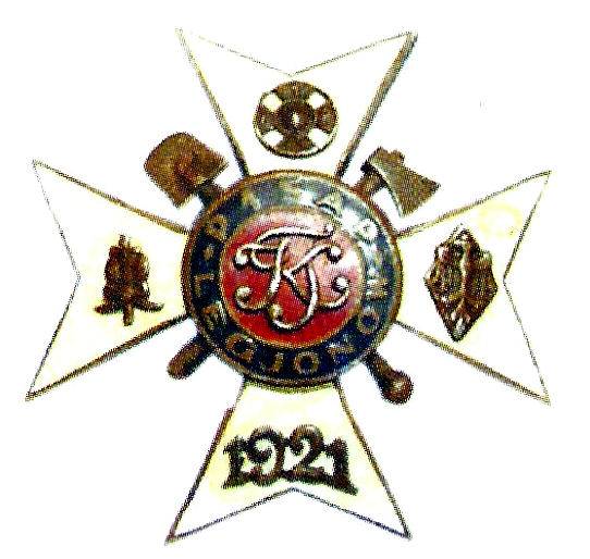 Odznaka pamiątkowa 1 psap